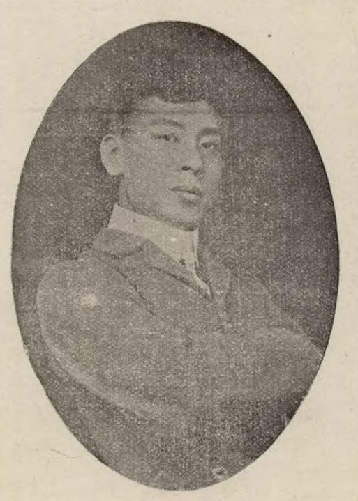 中文（台灣）: 何劍士的黑白肖像圖